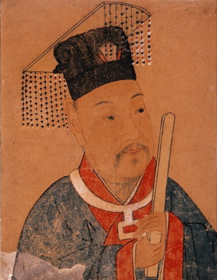 中文（台灣）: 史彌遠（1164年2月23日－1233年11月27日），字同叔，中國南宋中期奸臣，權臣。孝宗時代宰相史浩之子。浙江鄞縣人。